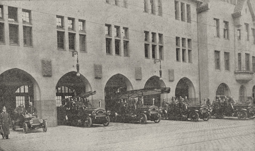 Eröffnung des Hauptfeuerwehrdepots in Düsseldorf, Münsterstraße 15, am 15. Dezember 1911, Foto Jean Esser